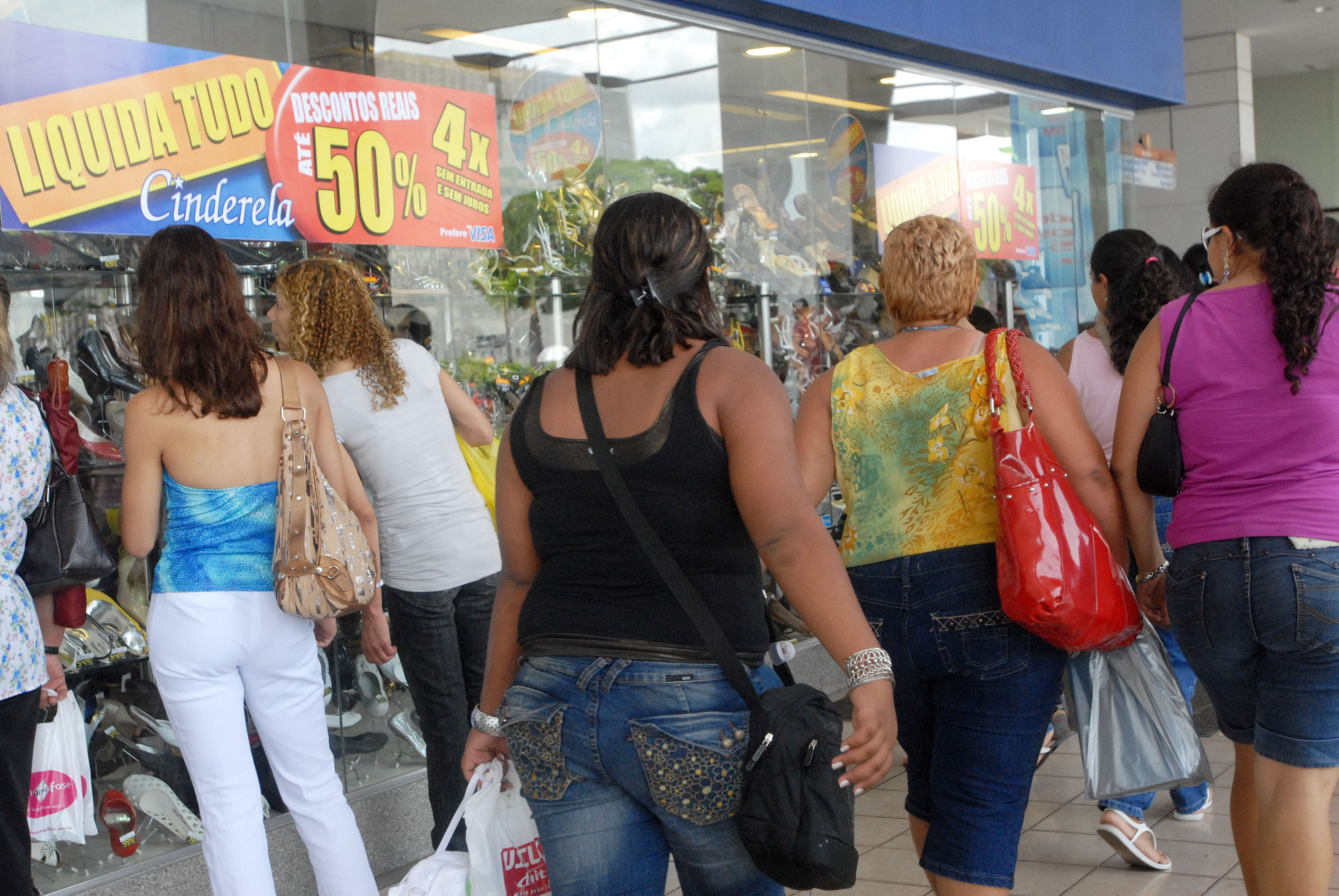 Entrada de uma loja em Brasília.